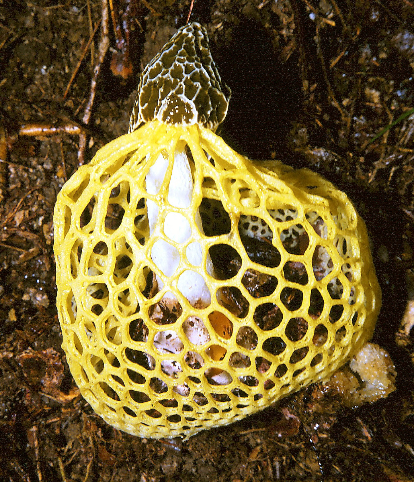 Tisseur de soie jaune, Dame voilée jaune, ウスキキヌガサタケ